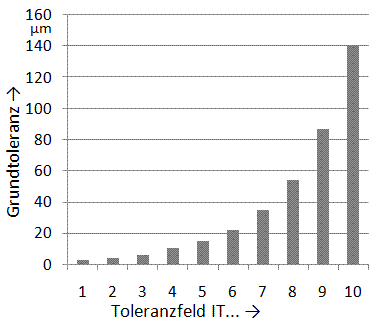 Große der Toleranzfelder für die Grundtoleranzgrade IT4 bis IT10 im Nennmaßbereich von 80 bis 120mm